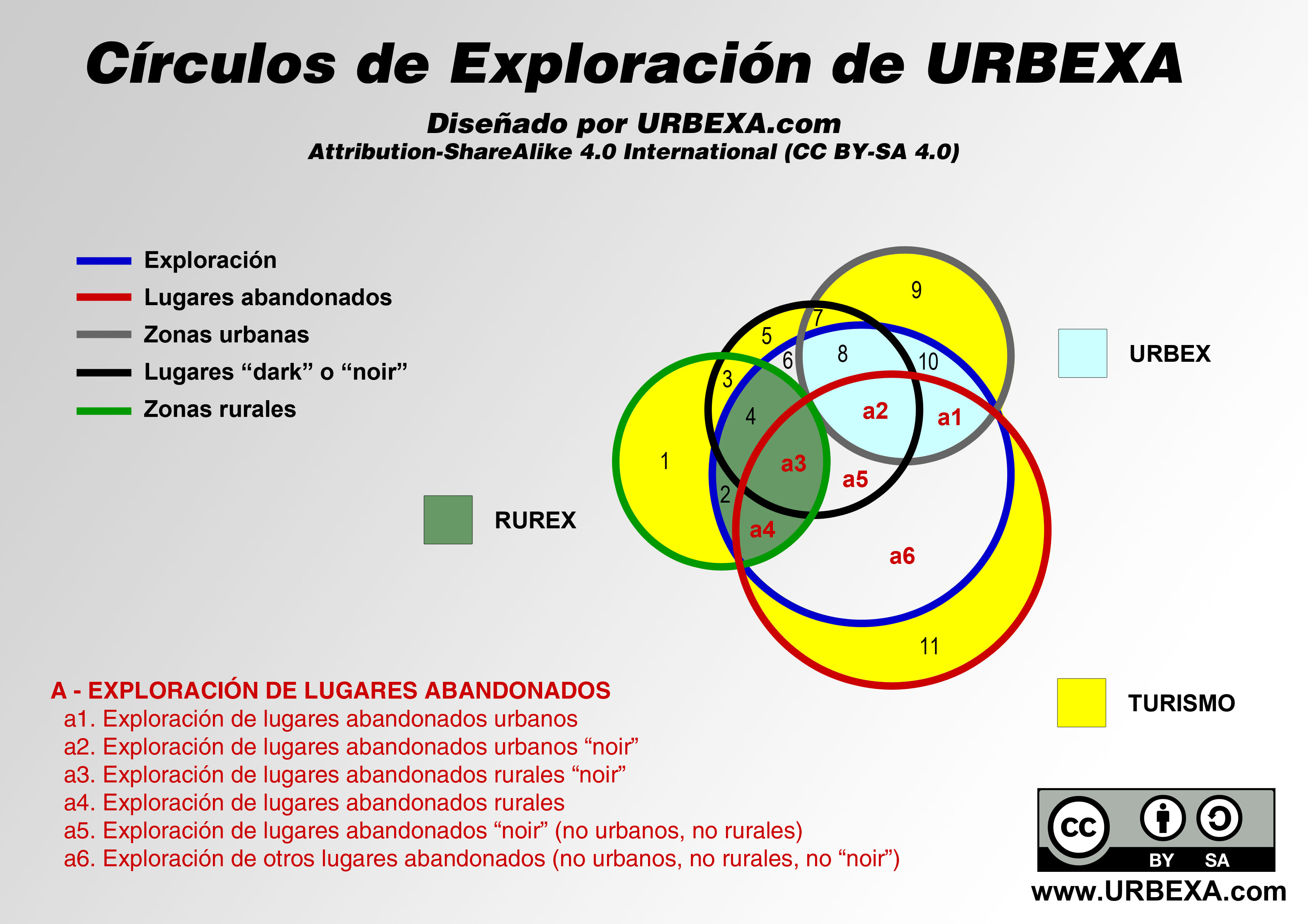 Diagrama que explica los diferentes tipos de exploraciones de lugares abandonados (urbex, rurex, tanatex, etc.).